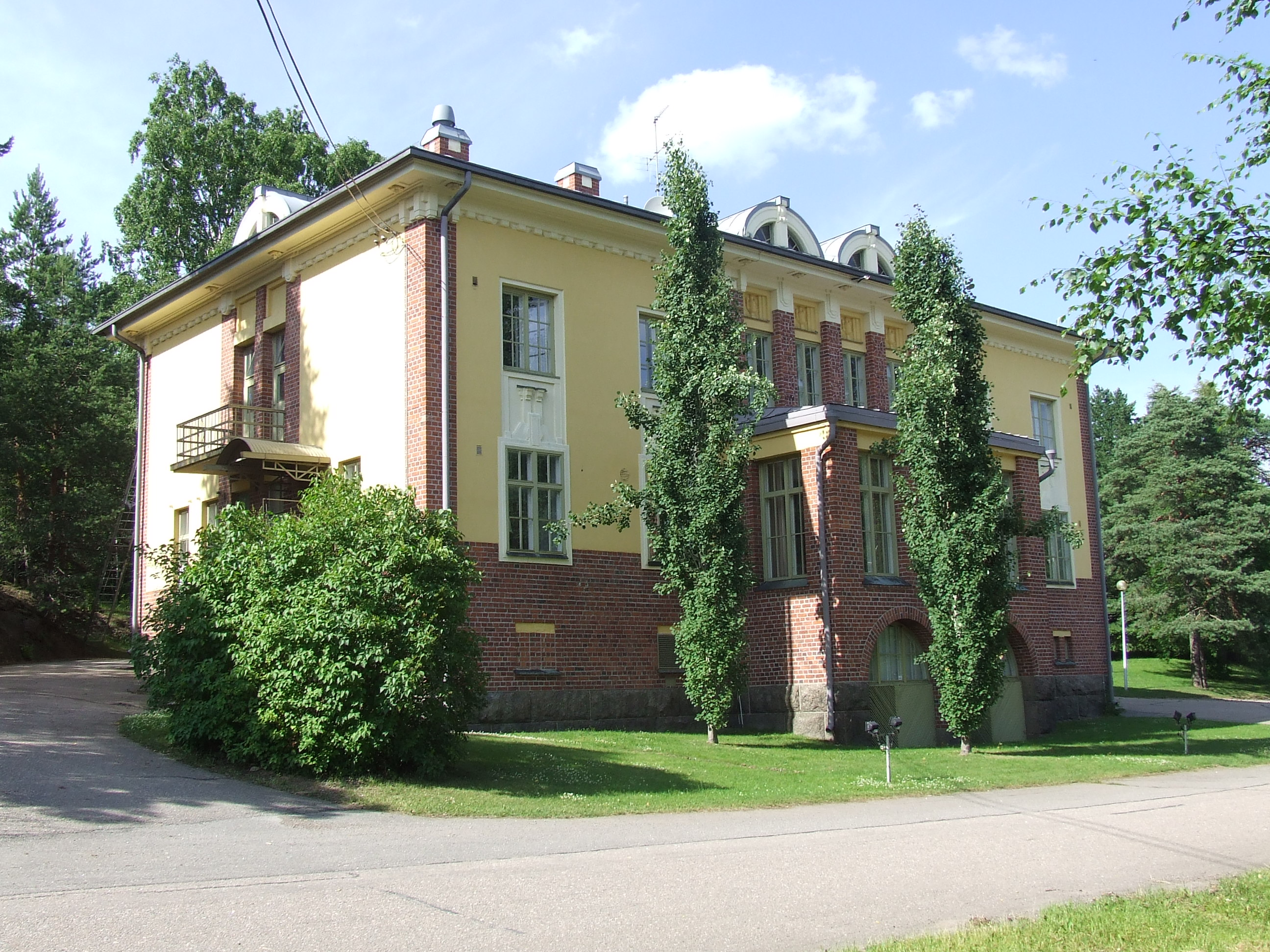 Voikkaan virkamiesklubi Kouvolassa.